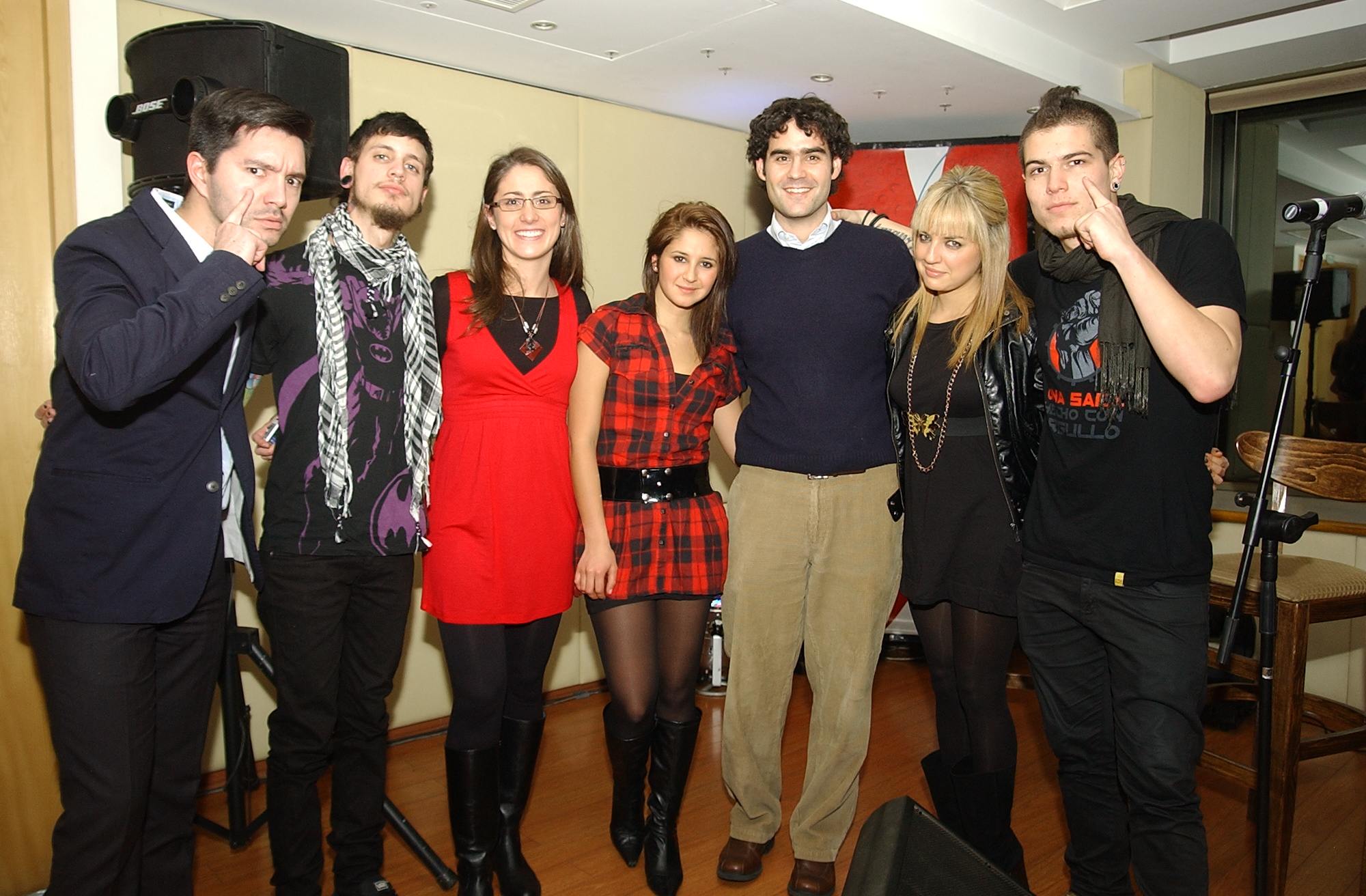 Teen Top Ernest con Kudai en 2009.